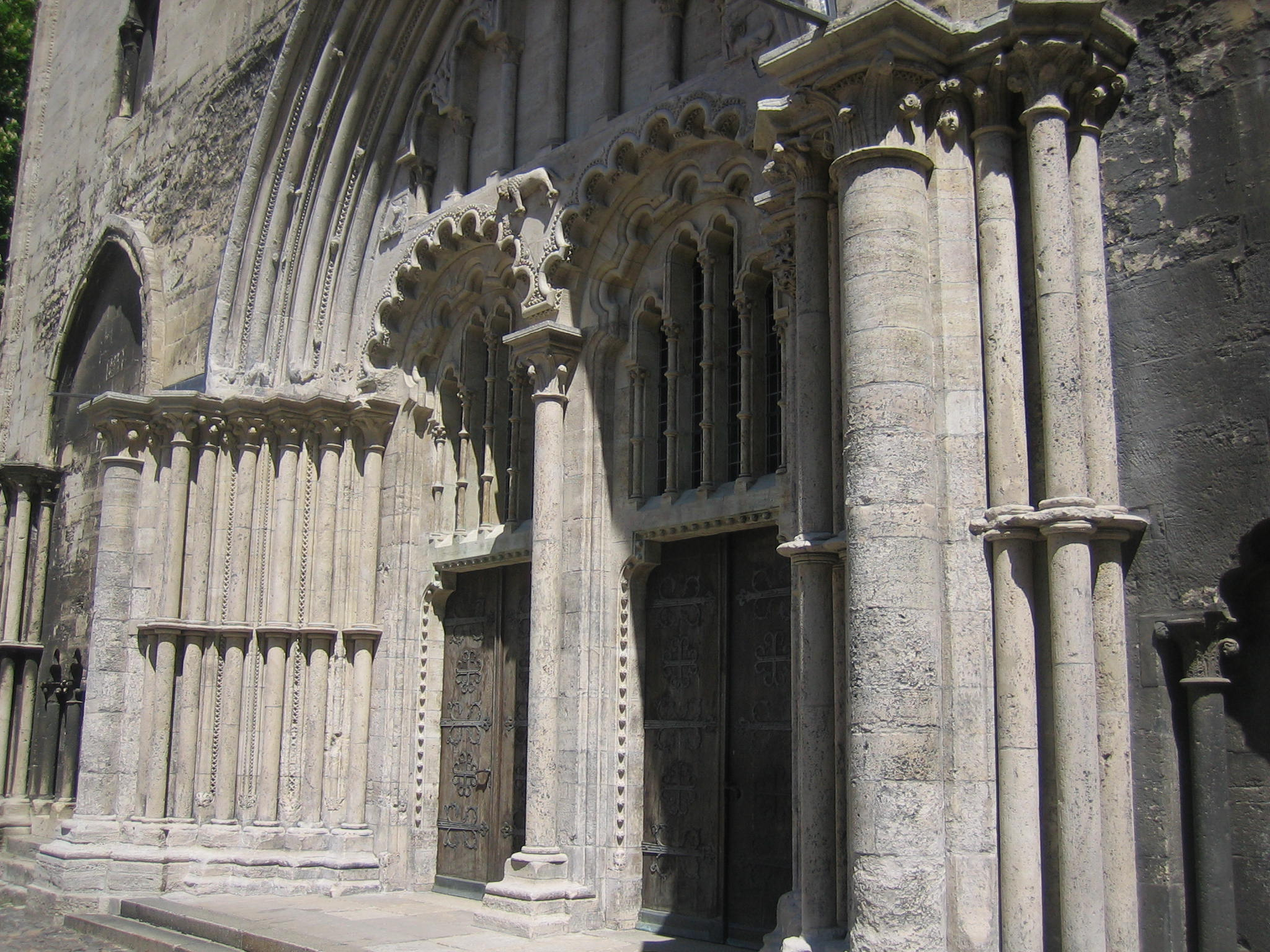 Portal des Doms zu Halberstadt